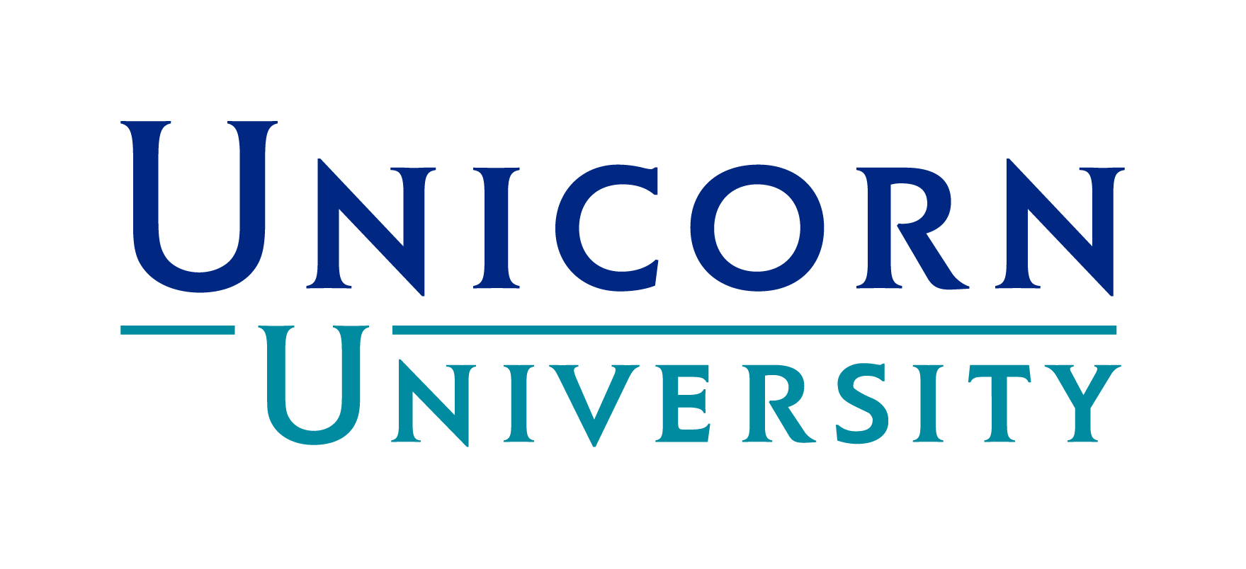 logo Unicorn Univeristy